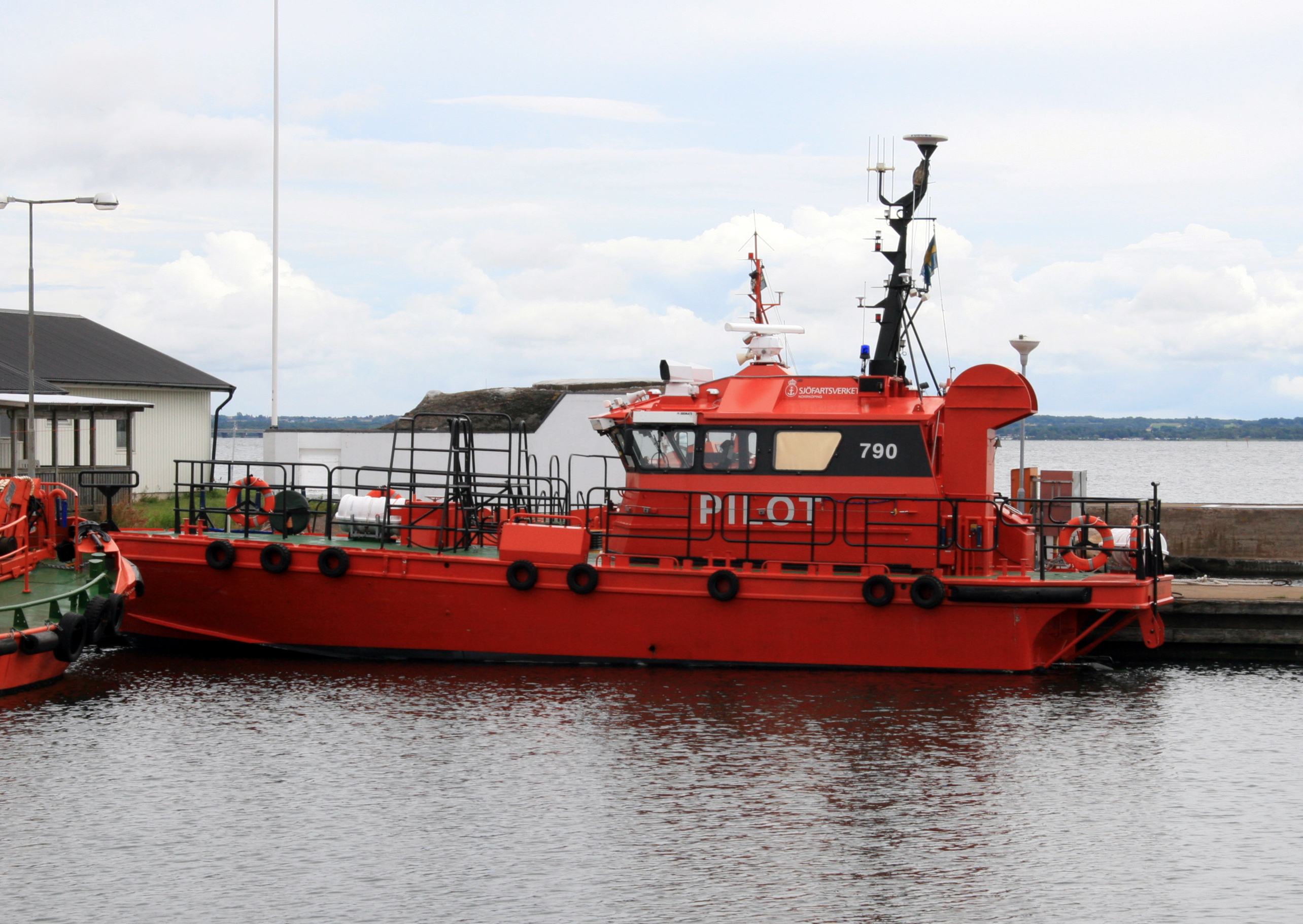 Pilot 790 SE i Kalmar 20 juli 2008